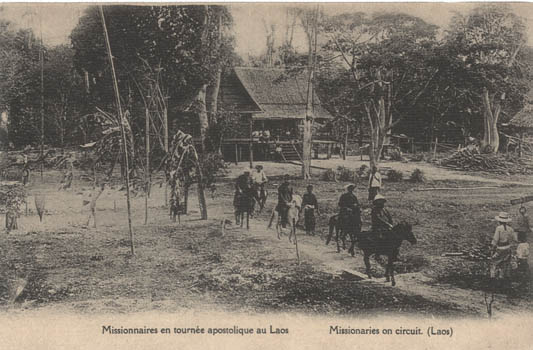 Missionnaires des Missions étrangères de Paris au Laos au début du XXe siècle. Carte postale des MEP.